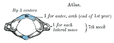 Atlas.